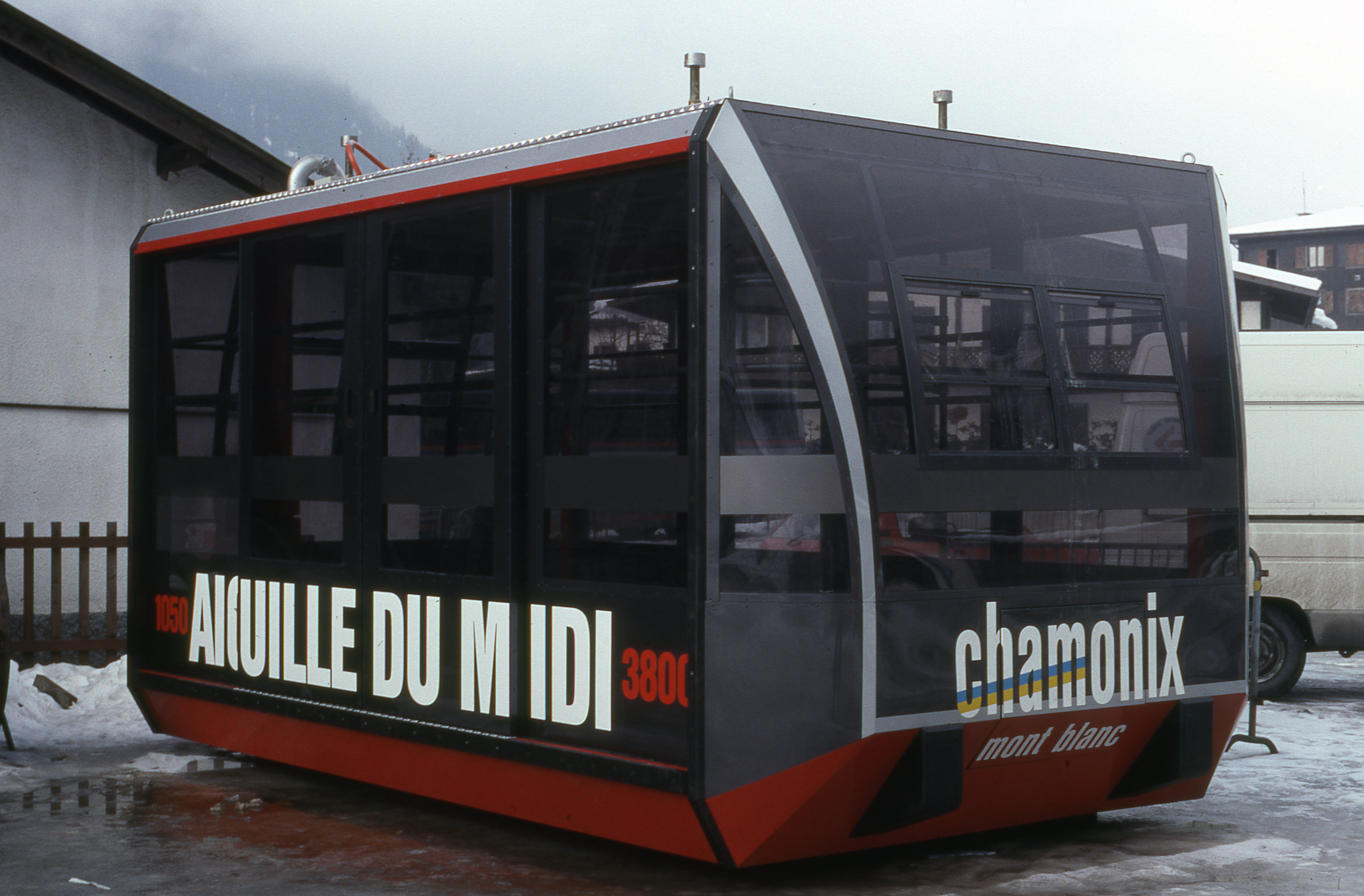 Chamonix-Mont-Blanc : nouvelle cabine du téléphérique